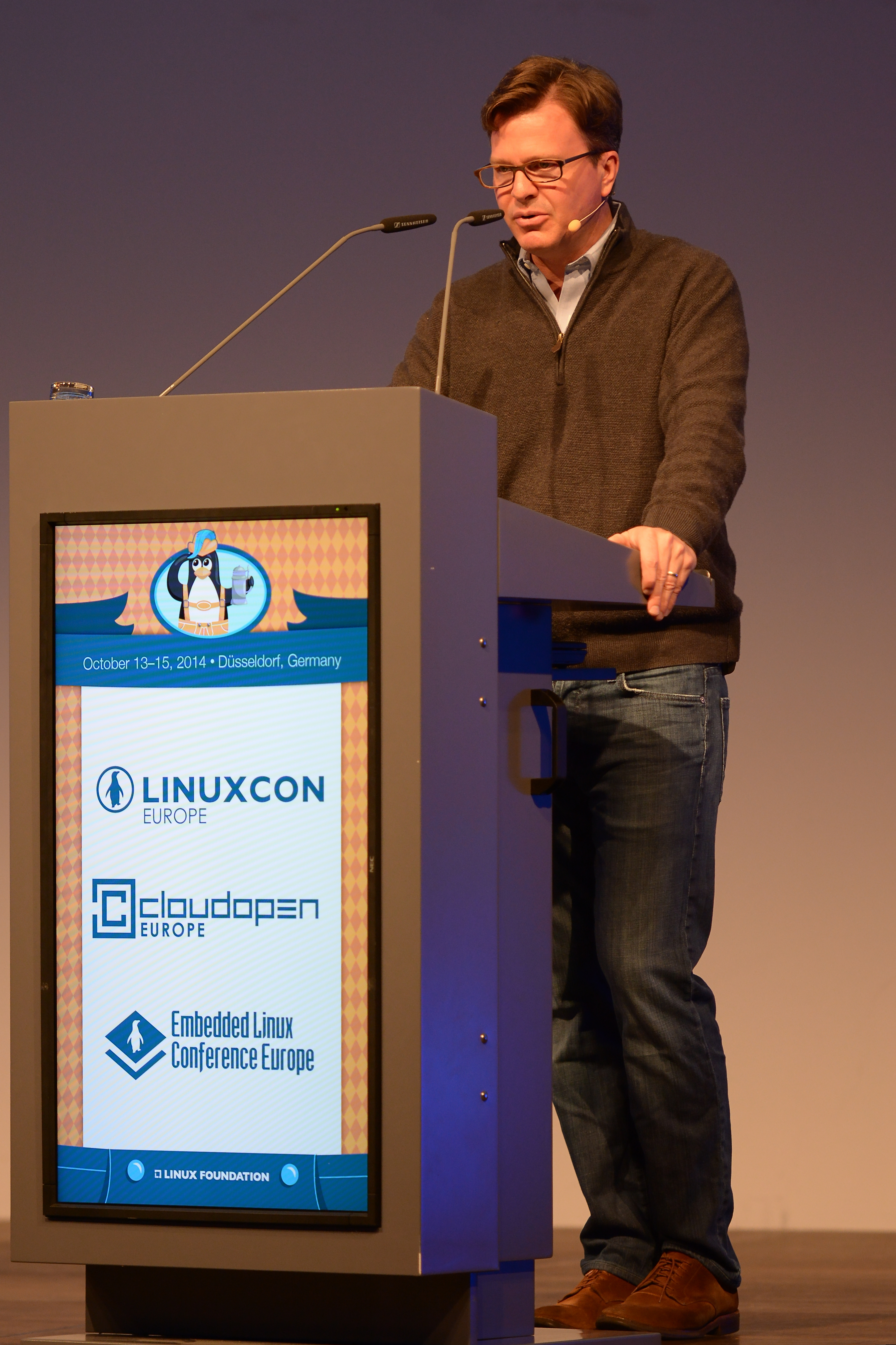 Jim Zemlin speaking at the LinuxCon Europe 2014 in Düsseldorf